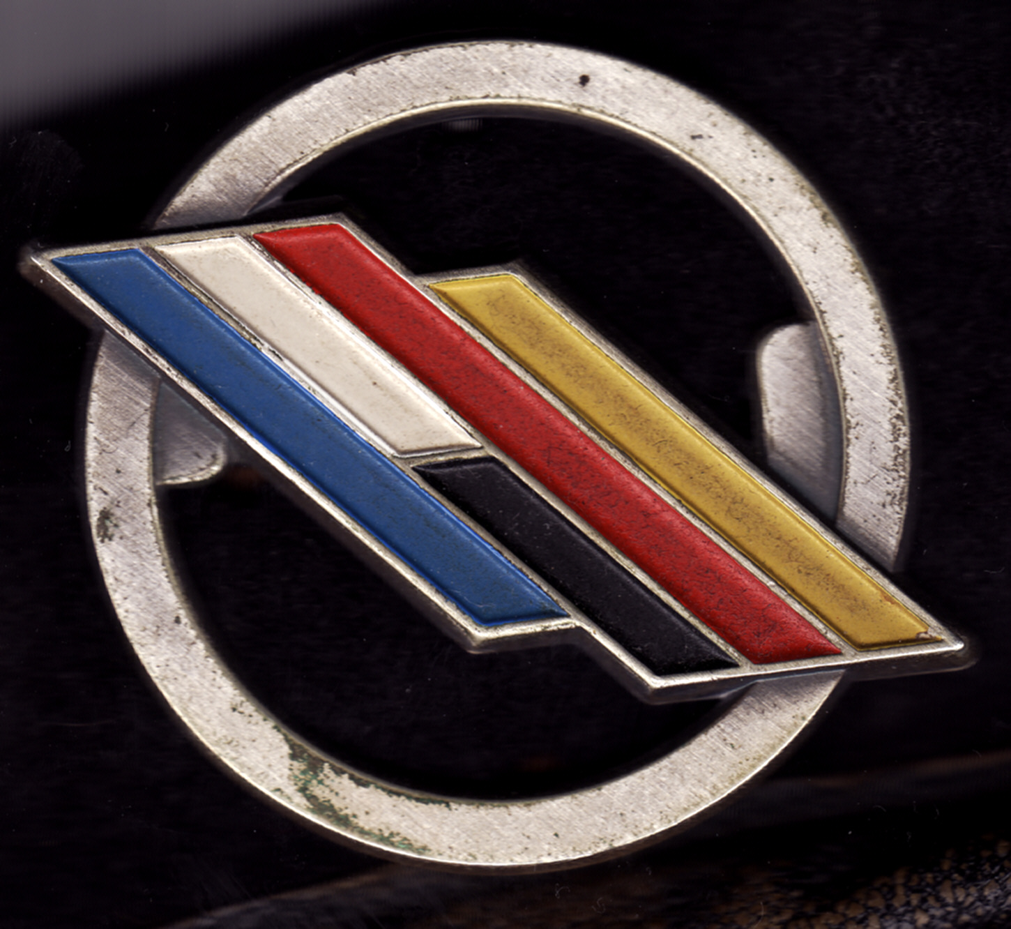 Insigne de beret de la BFA